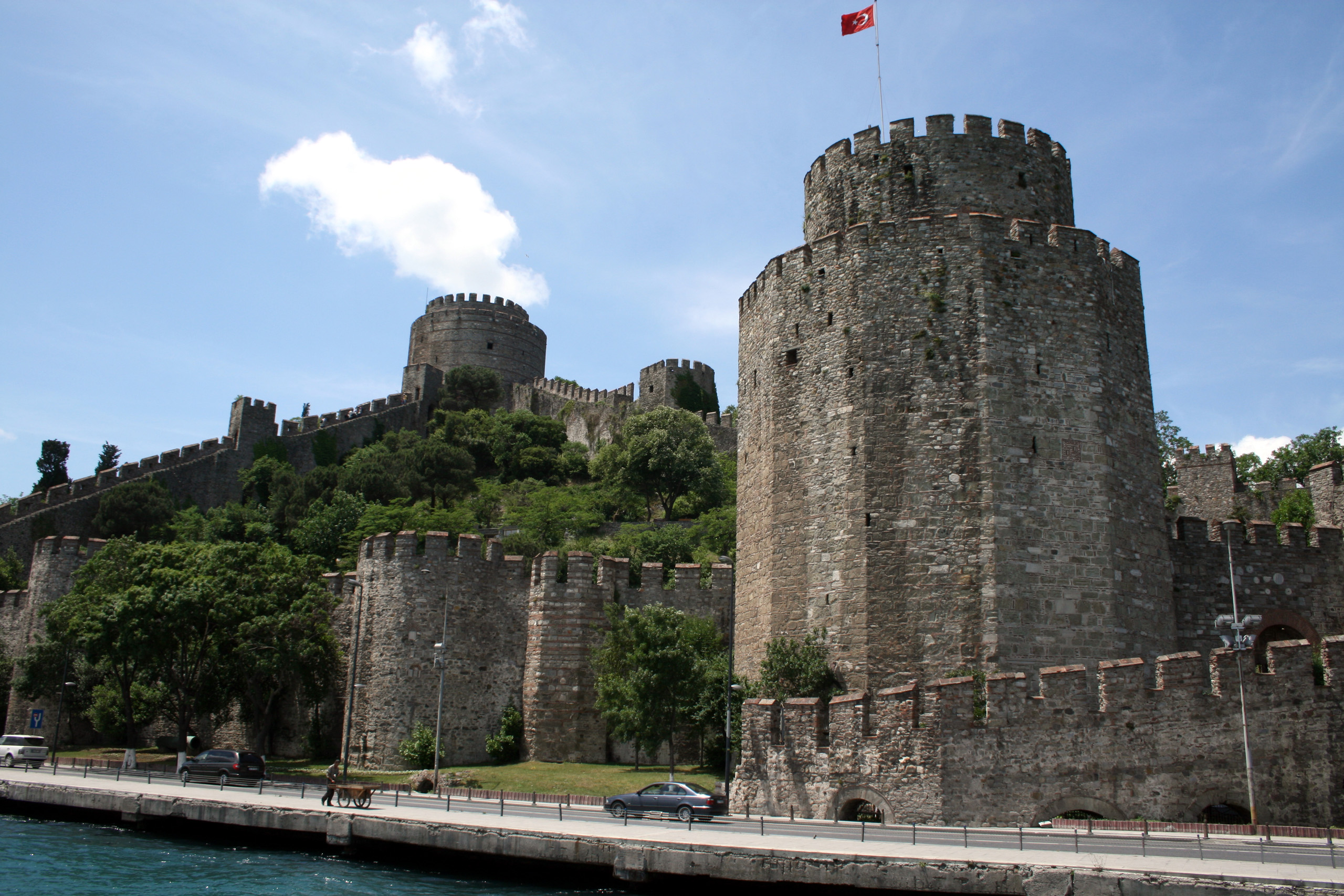 La forteresse Rumeli Hisari au bord du Bosphore